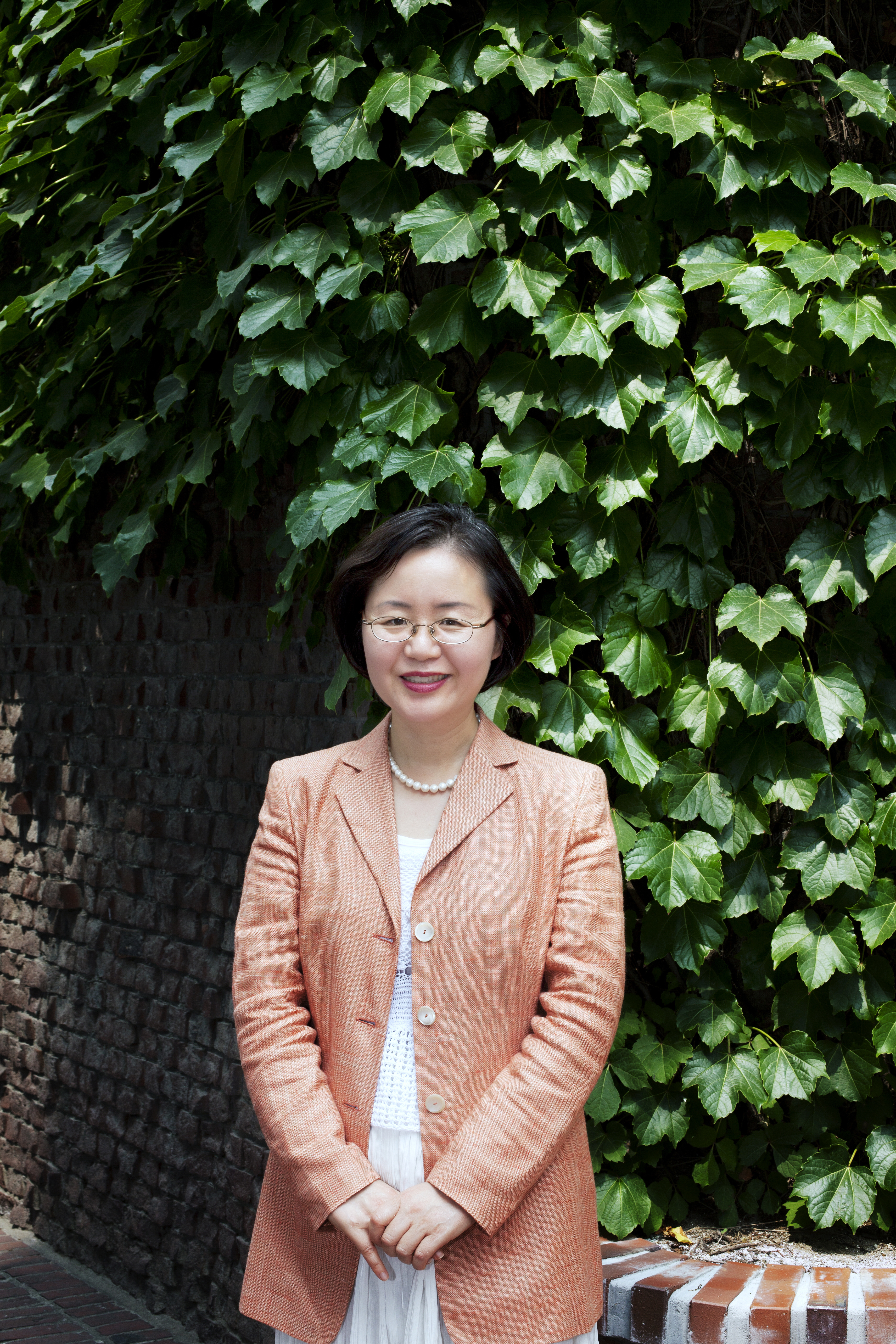 연세대학교 정미현 교수의 사진